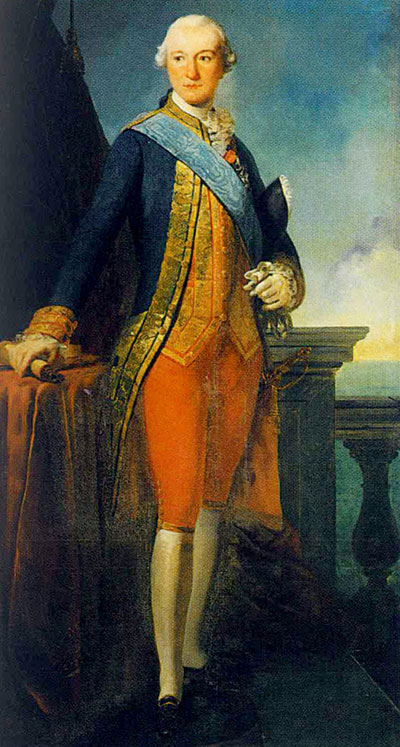 Louis Philippe d'Orléans (1747-1793), en tenue d'officier de marine et arborant le cordon bleu de l'ordre du Saint-Esprit.